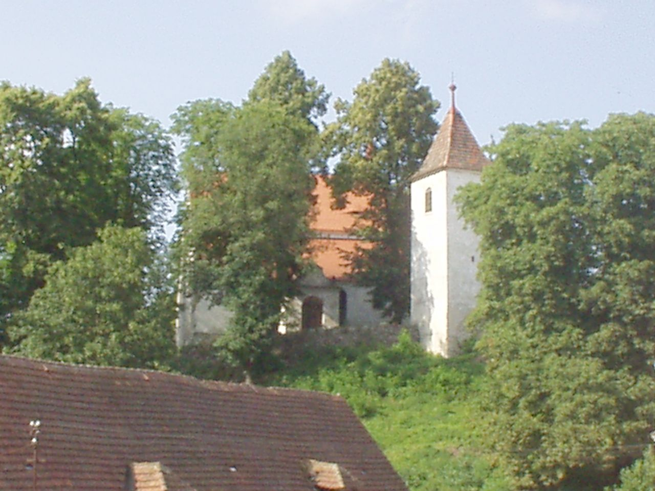 kostel sv. Petra a Pavla v Záboří (okres Strakonice) byl založen v 1. polovině 13. století na návrší o nadmořské výšce 561 m, první písemný doklad o kostele pochází z roku 1305; zvonice z roku 1713 nahradila starší dřevěnou stavbu, která vyhořela někdy koncem 16. století